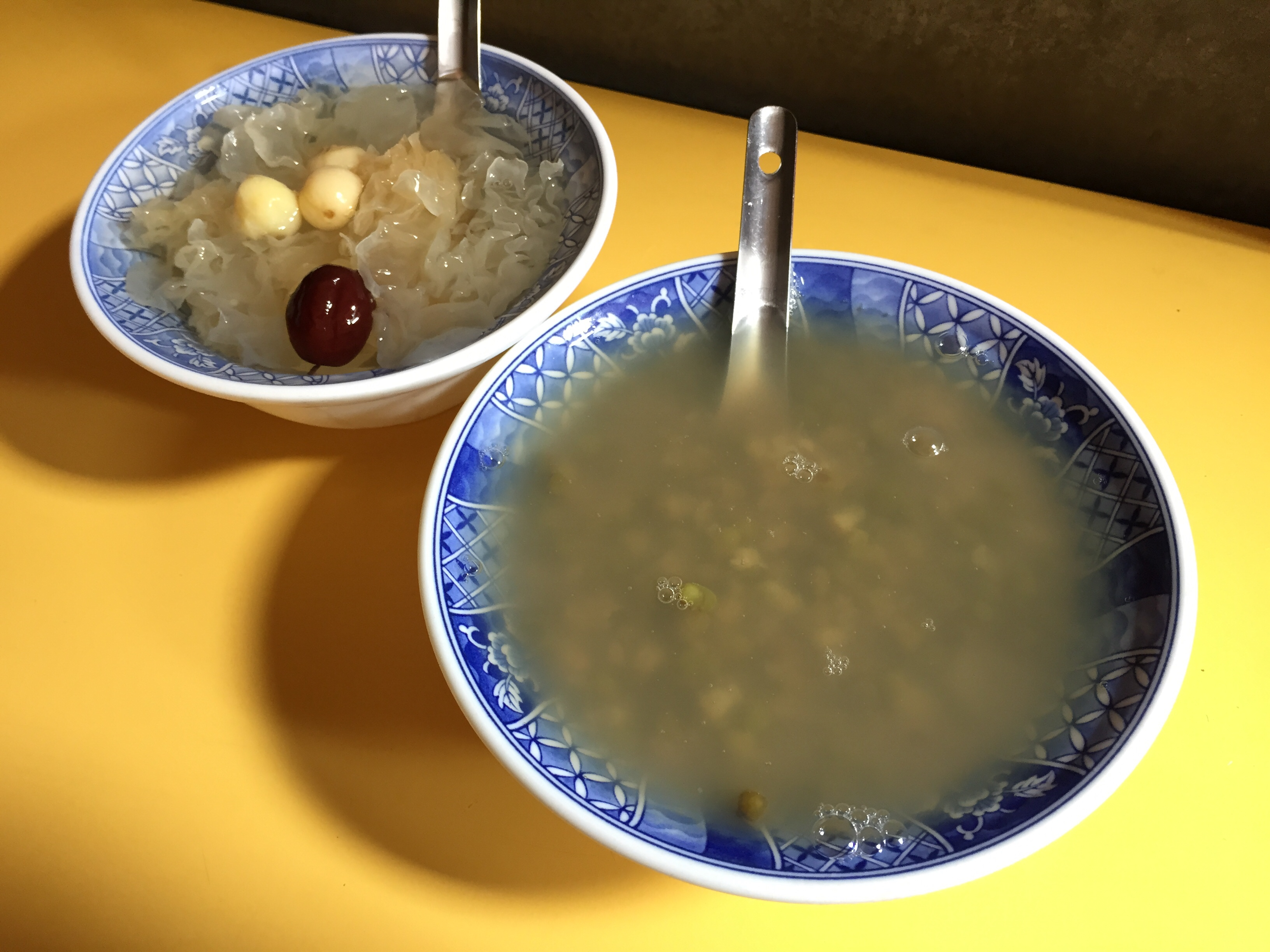 綠豆湯, 冰糖銀耳, 阿猜嬤, 甜湯鹹圓, 台北